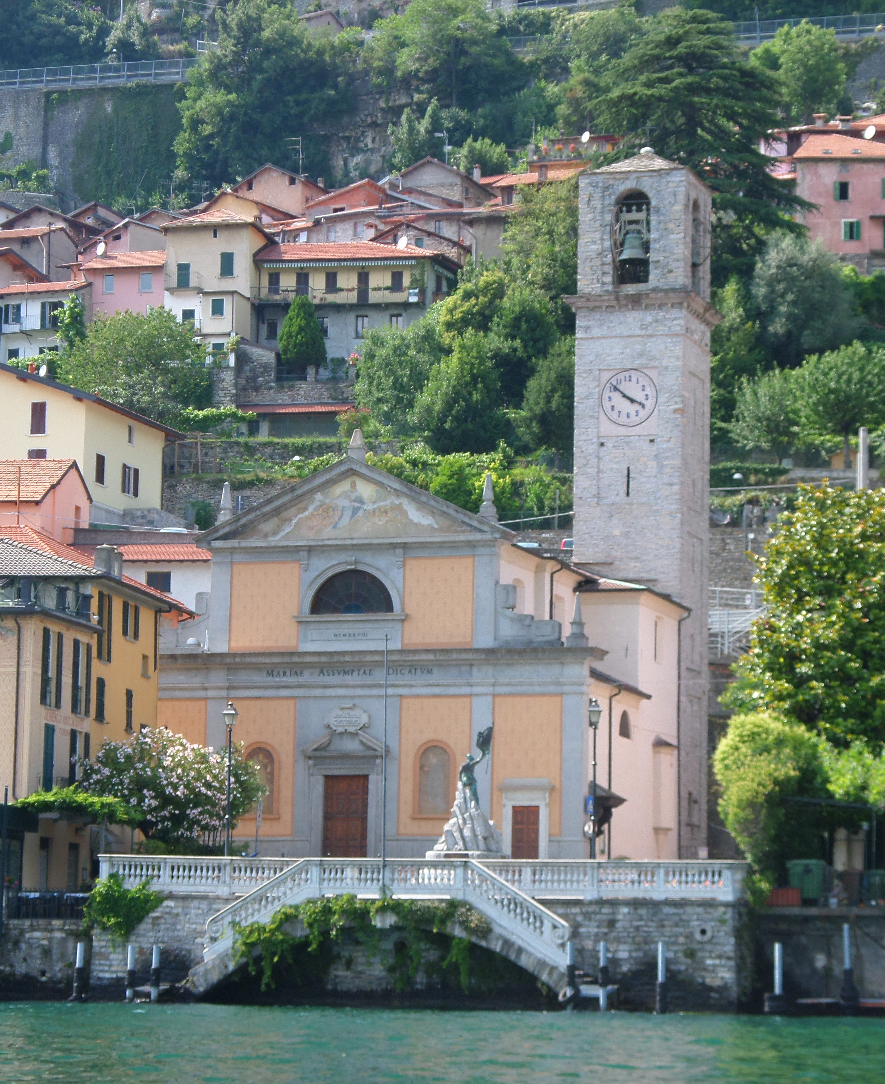 Chiesa parrocchiale di Carate